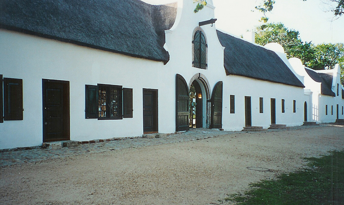 Sujet: Vull am Krügerpark Source: Eege Foto vum iuser ernmuhl Lizenz:GDFL